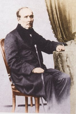 Domingo Elías Carbajo, anciano